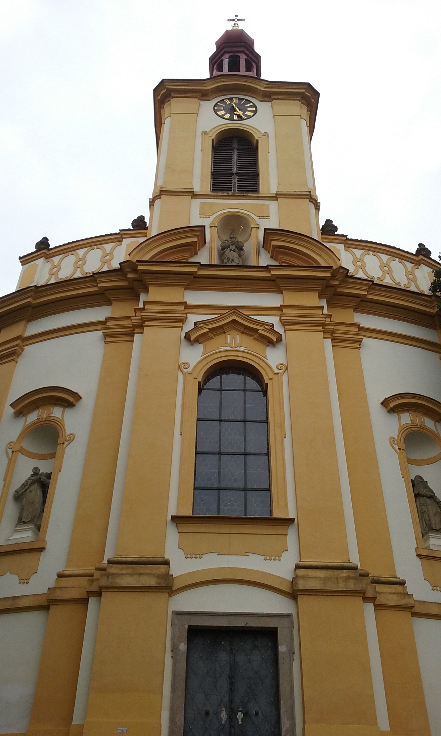 Fasáda kostela Panny Marie Sedmibolestné v Rabštejně nad Střelou. Okres Plzeň-sever, Česká republika.